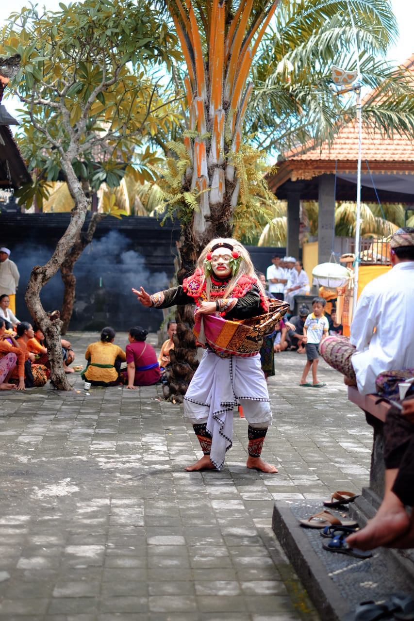 Topeng Sidarya adalah bagian dari pementasan tari topeng yang mengiringi upacara besar di Bali, seperti upacara ngaben. Topeng Sidakarya dianggap sebagai pelengkap upacara-upacara tersebut.